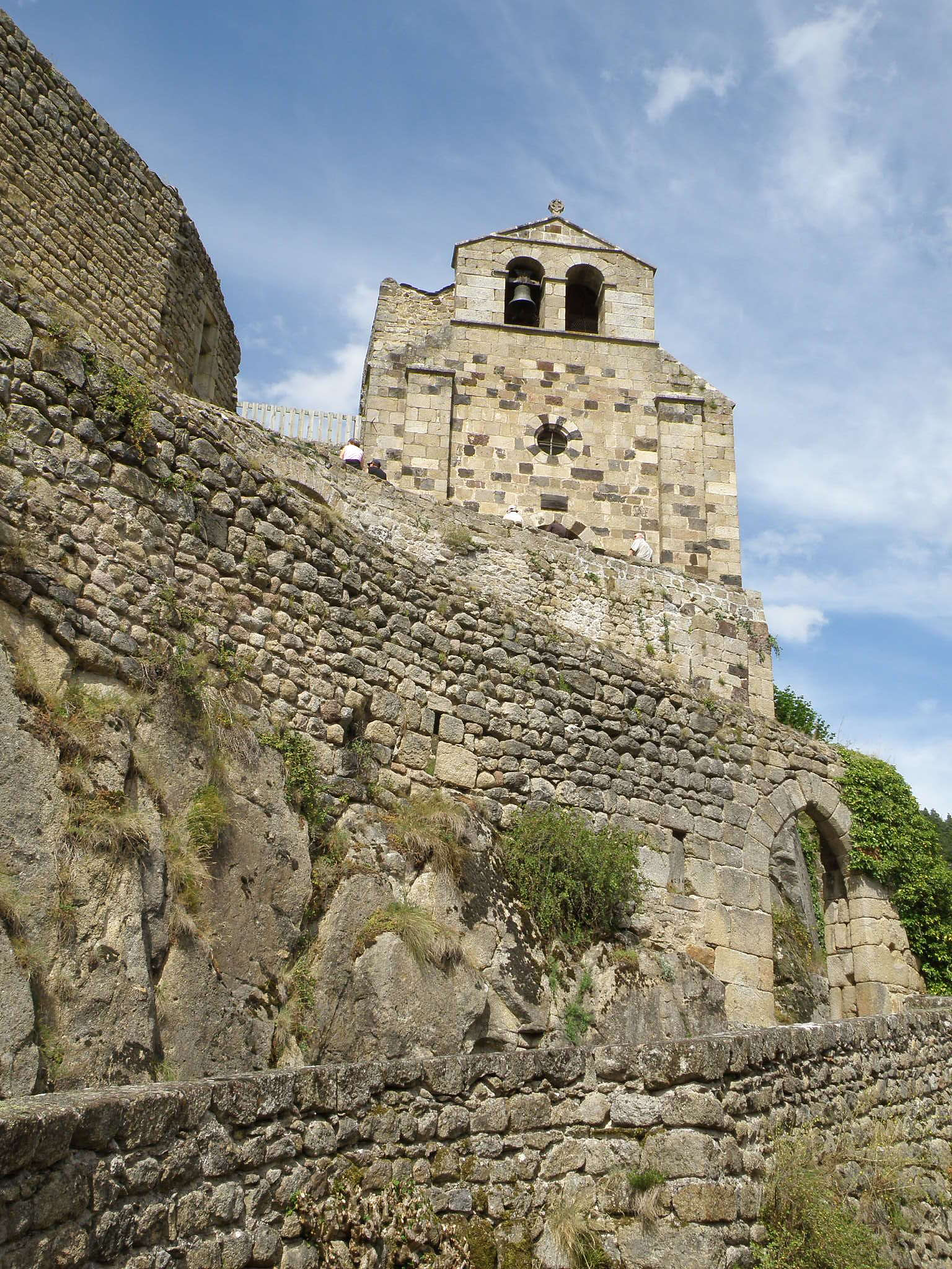 Hameau de Chalencon, appartenant à la comm. de Saint-André-de-Chalencon, dép. de la Haute-Loire, France (région Auvergne). Chapelle (XIe siècle) ; cloche (dans le campenard) de 1499.